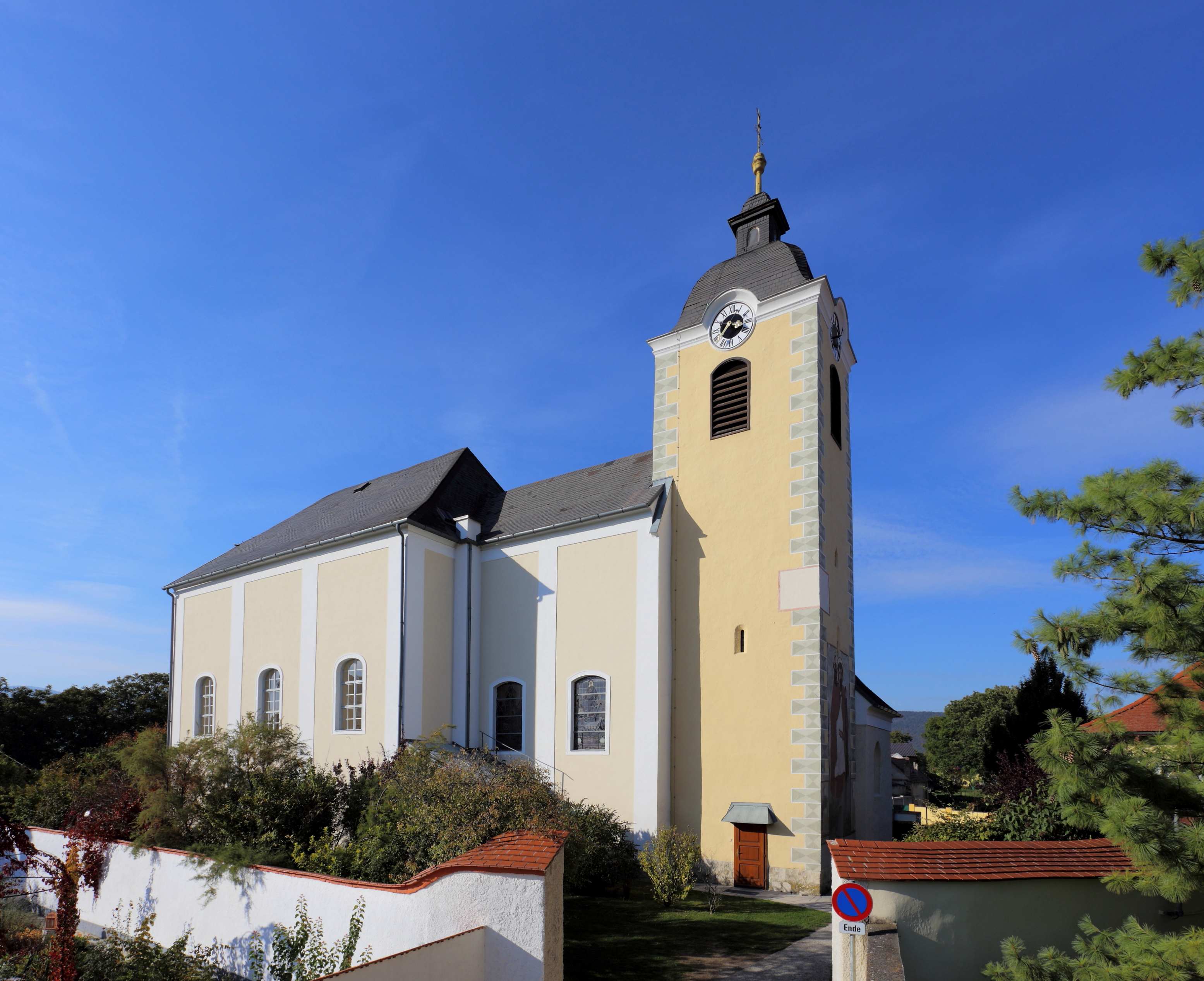 Südostansicht der römisch-katholischen Pfarrkirche hl. Jakobus d. Ä. in der niederösterreichischen Gemeinde Weikersdorf am Steinfelde. Ursprünglich eine romanische Chorquadratkirche aus der ersten Hälfte des 13. Jahrhundert, deren Kernsubstanz noch vorhanden ist. In der ersten Hälfte des 14. Jahrhunderts Bau des Turmes über dem Chorquadrat. Im 15./16. Jahrhundert wurde nordseitig die Annenkapelle errichtet, die seit 1753 als Sakristei dient. Unter dem Wiener Domherr Franz Zeißler erfolgte 1753 ein Um- und teilweiser Neubau. So wurde unter anderem das dreijochige Langhaus errichtet, der Chor erhöht und der Turm um eine Glockenstube aufgestockt sowie ein barocker Turmhelm aufgesetzt.